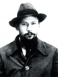 Basil Yakovlev